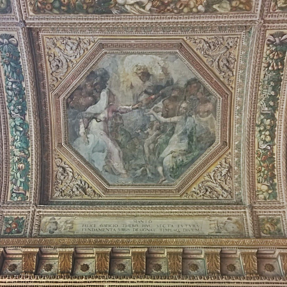 Affresco sulla volta della sala della Mostra nell'Appartamento della Rustica nel Palazzo Ducale di Mantova.